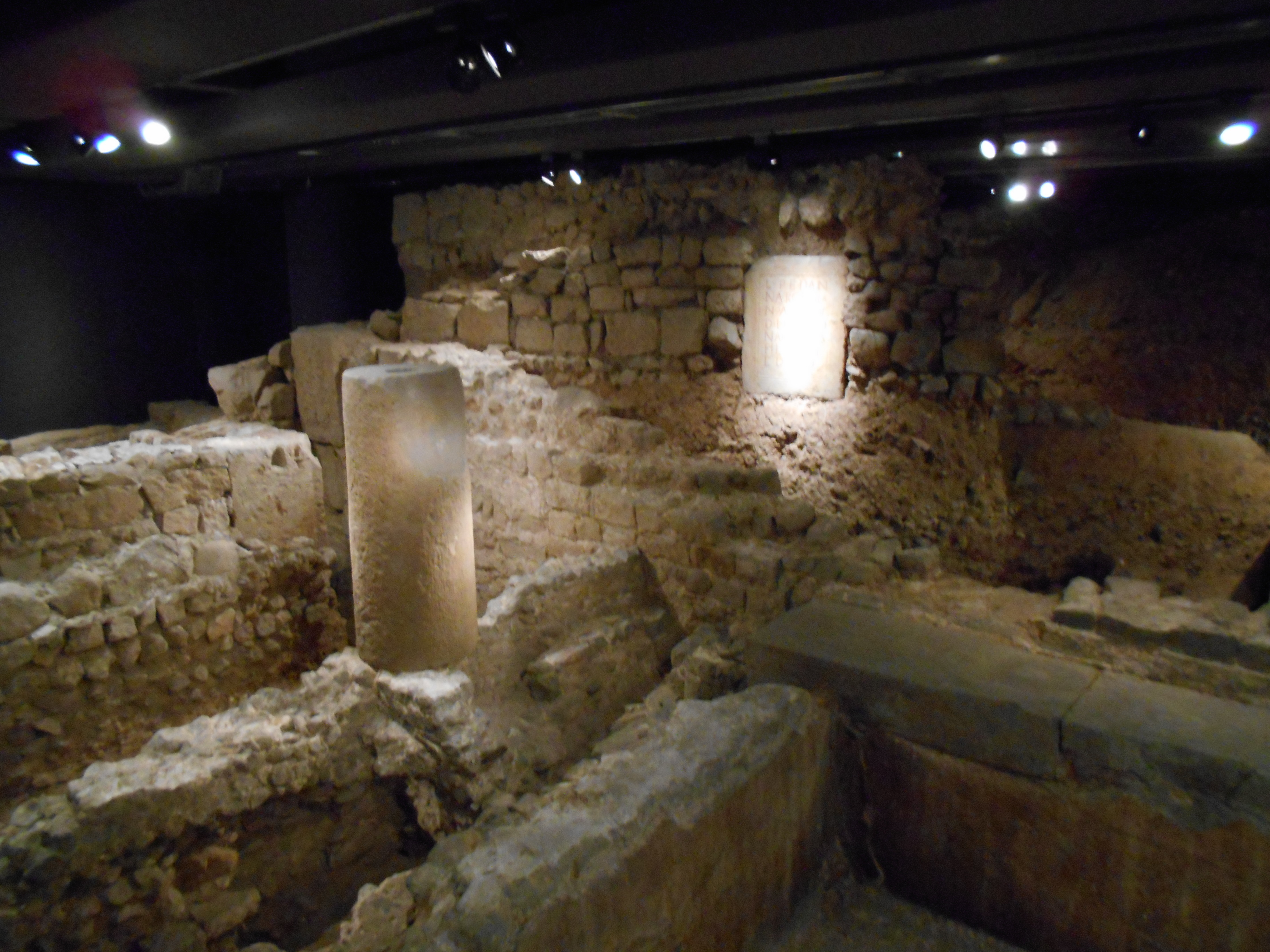 Restos arqueológicos romanos, Museo de Historia de Barcelona.